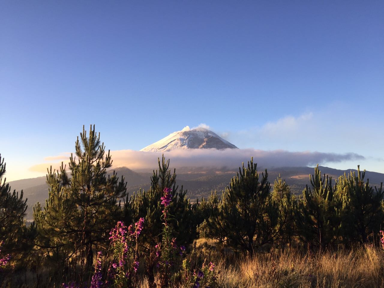 Volcán Popocatépetl visto desde el volcán Iztaccíhuatl